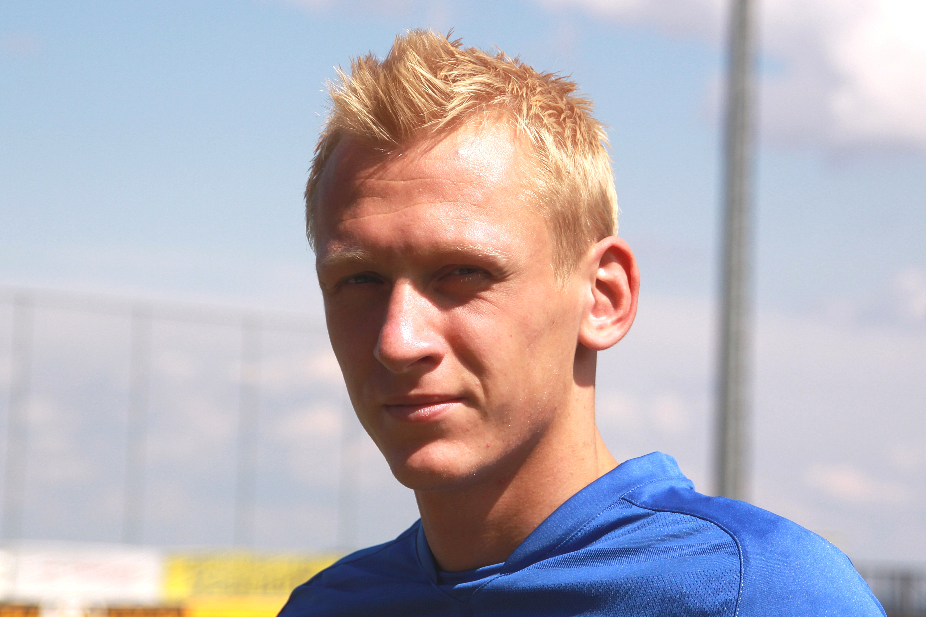 Sascha Burchert - Hertha BSC Berlin (2)